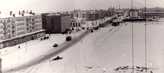 пгт. Строитель, ул. Ленина, начало 1980-х гг.